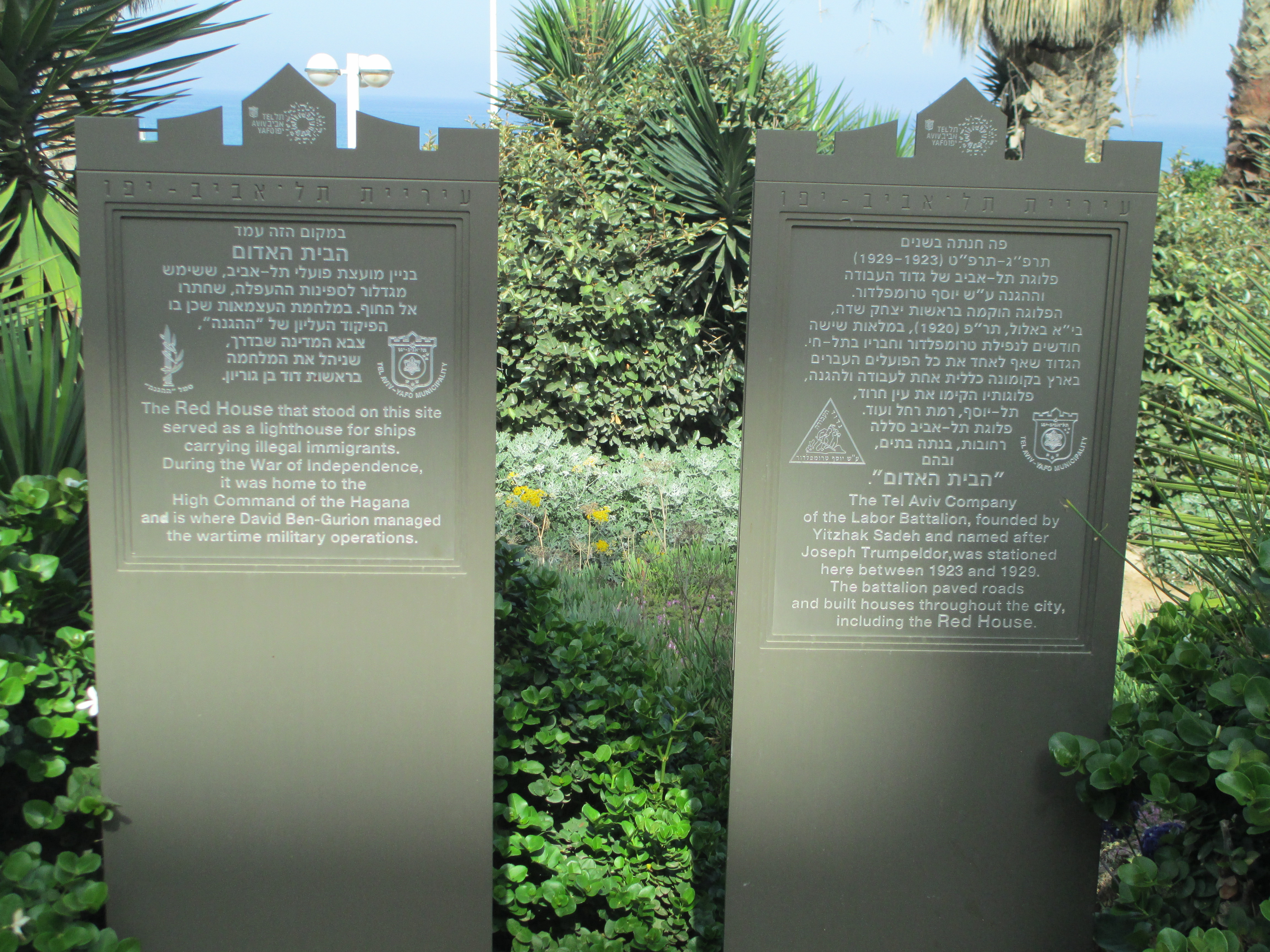 לוחיות זיכרון לבית האדום ולגדוד העבודה ליד מלון שרתון בתל אביב